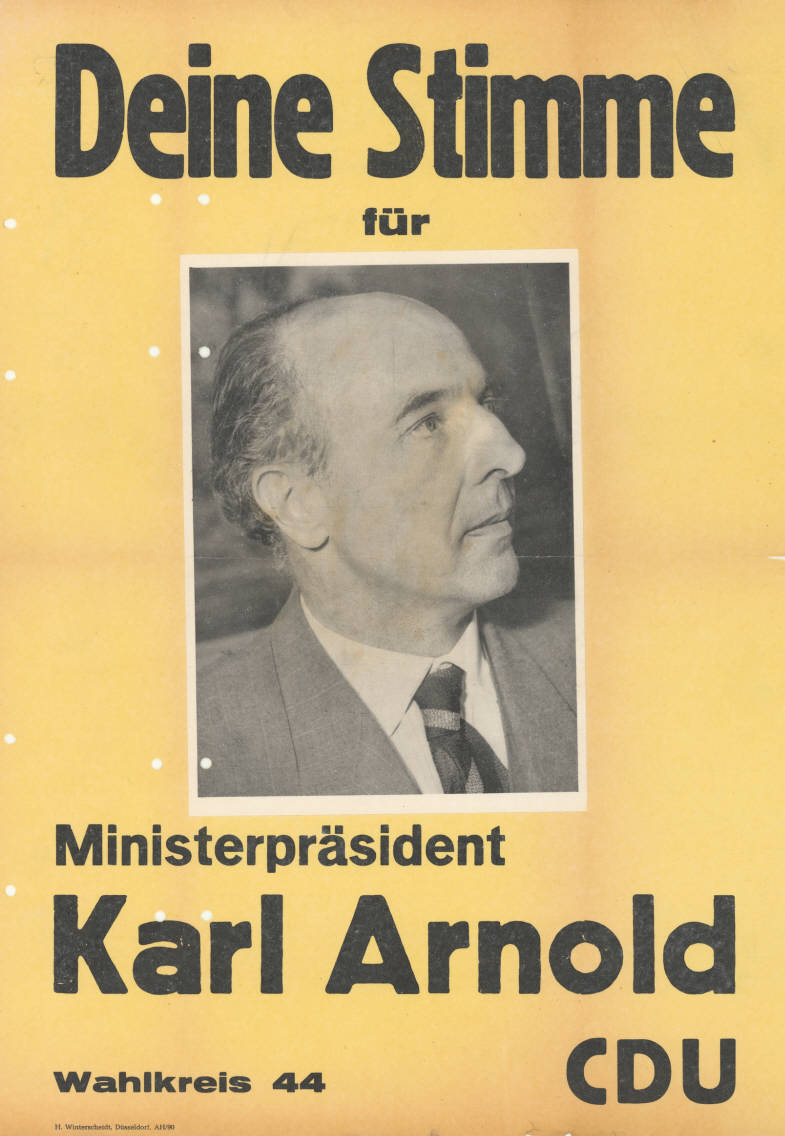 Deine Stimme für Ministerpräsident Karl Arnold Wahlkreis 44 CDU Abbildung: Porträtfoto Kommentar: Das Foto ist aufgeklebt. Plakatart: Kandidaten-/Personenplakat mit Porträt Drucker_Druckart_Druckort: H. Winterscheidt, Düsseldorf, AH/90 Objekt-Signatur: 10-009 : 249.1 Bestand: Landtagswahlplakate Nordrhein-Westfalen (10-009) GliederungBestand10-18: Landtagswahlplakate Nordrhein-Westfalen (10-009) » Landtagswahl am 18.6.1950 » CDU » mit Porträtfoto Lizenz: KAS/ACDP 10-009 : 249.1 CC-BY-SA 3.0 DE